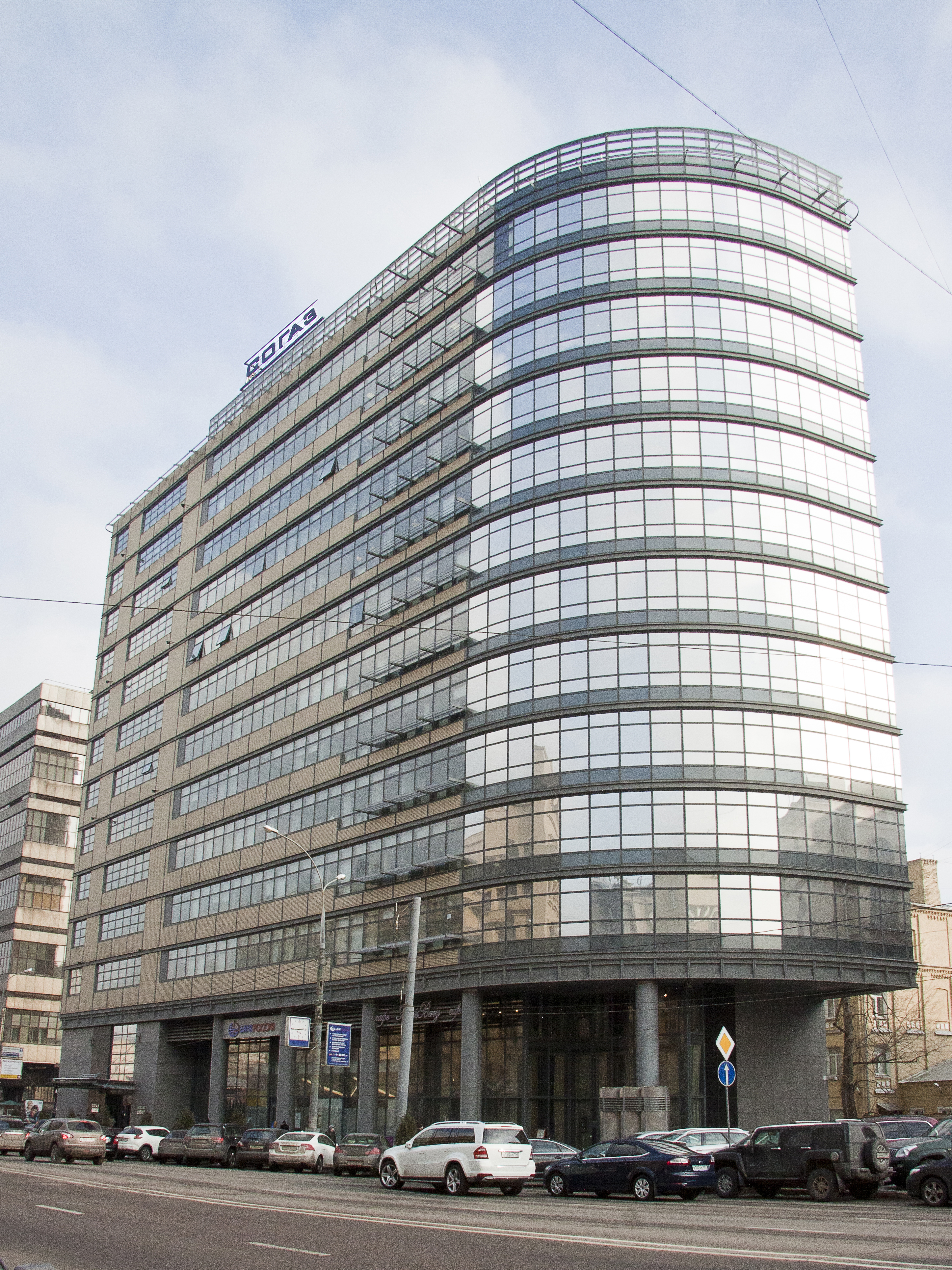 Здание страховой компании СОГАЗ на ул.Проспект Академика Сахарова